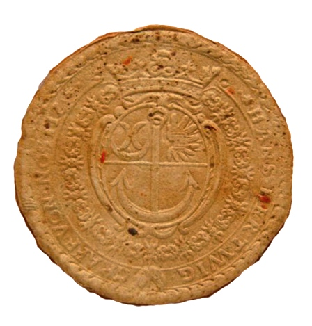 Jan Hartvík Nostic, Nejvyšší kancléř 1652- 1683 za vlády Ferdinanda III. Habsburského